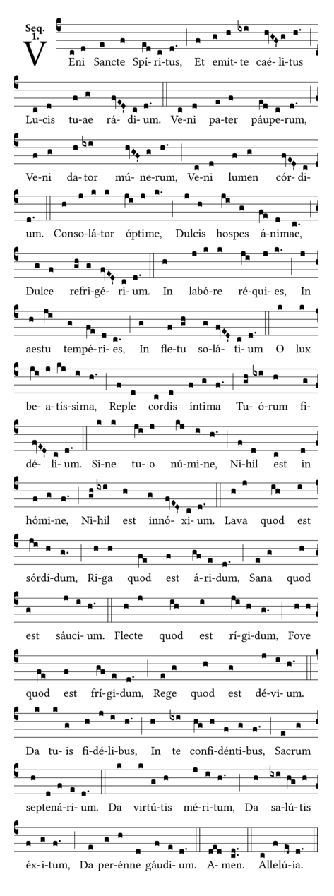 Pfingstsequenz Veni Sancte Spiritus